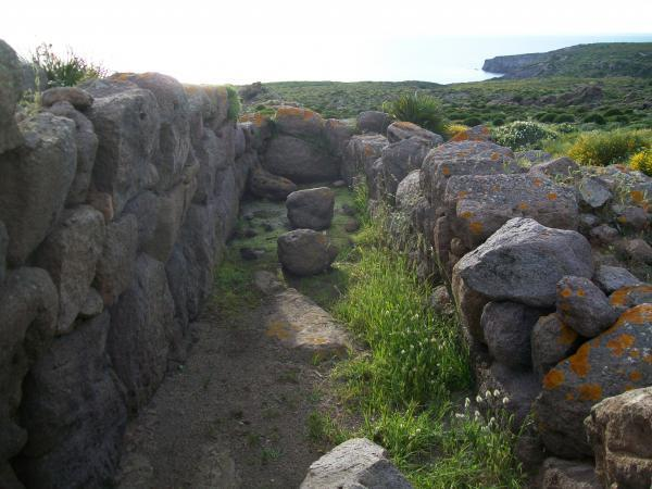 Tomba dei giganti Su Niu 'e su Crobu, Sant'Antioco